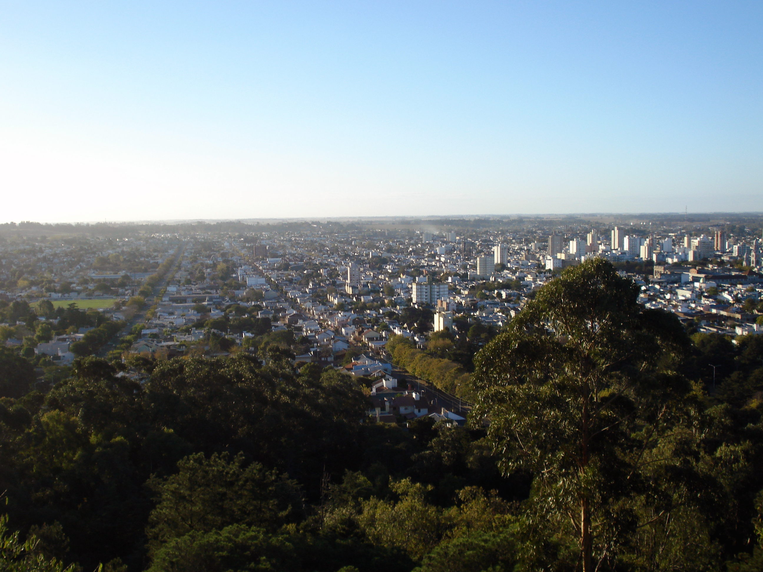 Fotografía tomada desde Castillo Morisco en Tandil, Buenos Aires, Argentina.